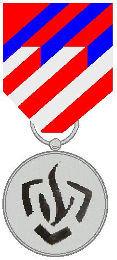 Brandweermedaille. De nieuwe medaille aan het draaglint.